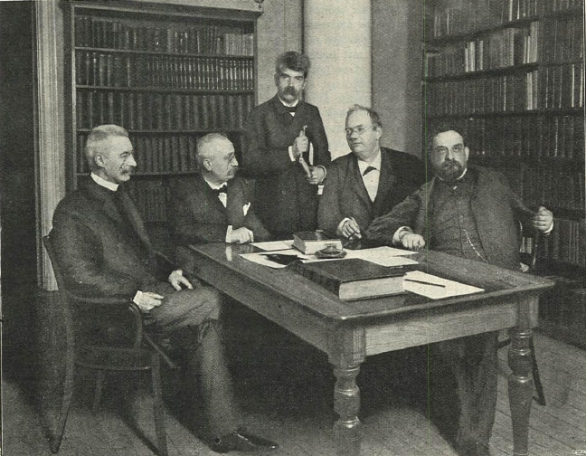 NORDISK FAMILJEBOKS REDAKTIONSKOMMITTÉ. FRÅN VÄNSTER TILL HÖGER: PROFESSOR V. LECHE; ARKIVARIEN D:R TH. WESTRIN, NORDISK FAMILJEBOKS REDAKTÖR; D:R B. MEIJER; LEKTOR J. F. NYSTRÖM; PROFESSOR K. WARBURG.